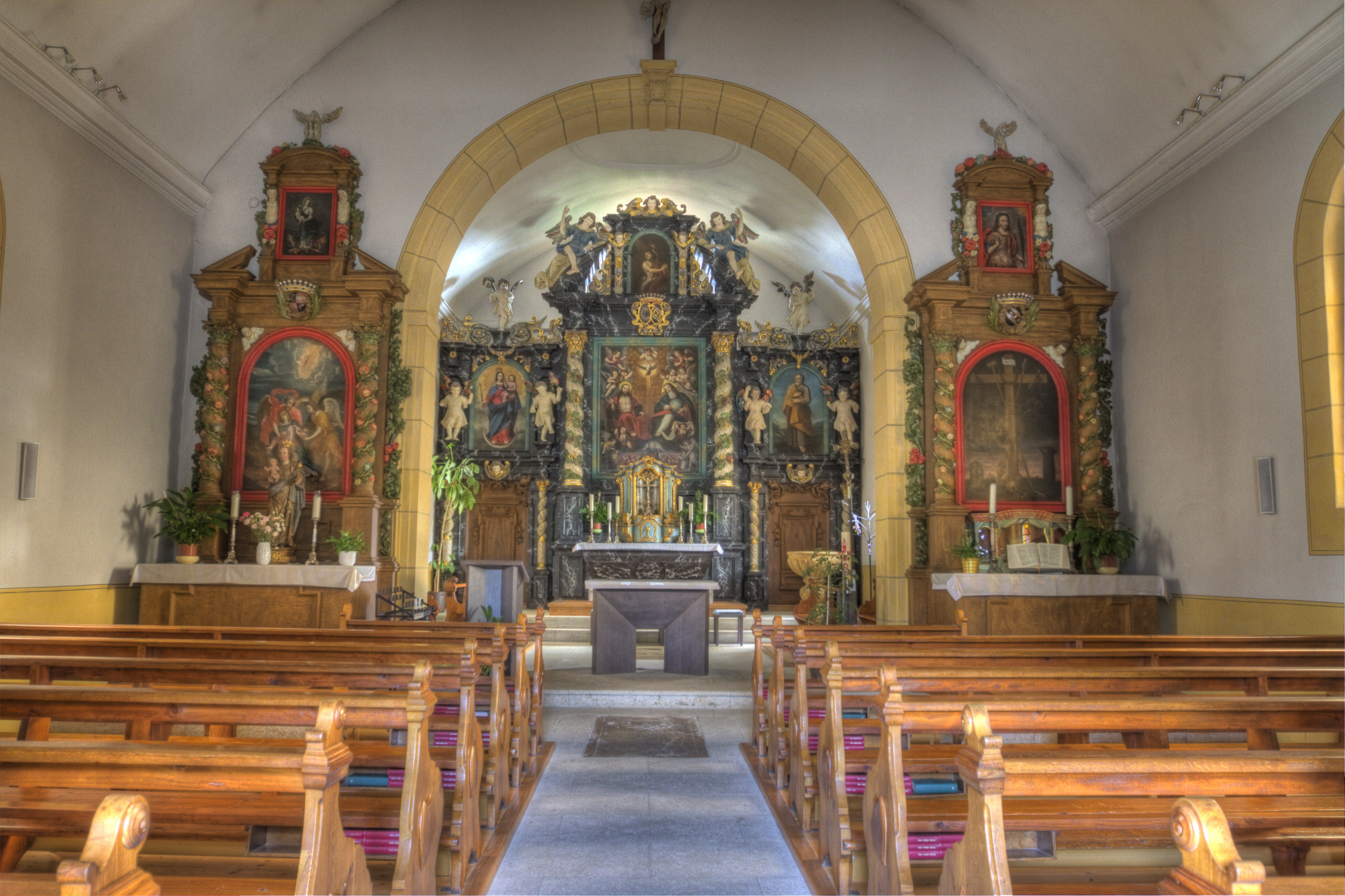 Vue intérieure et du cœur de l'église